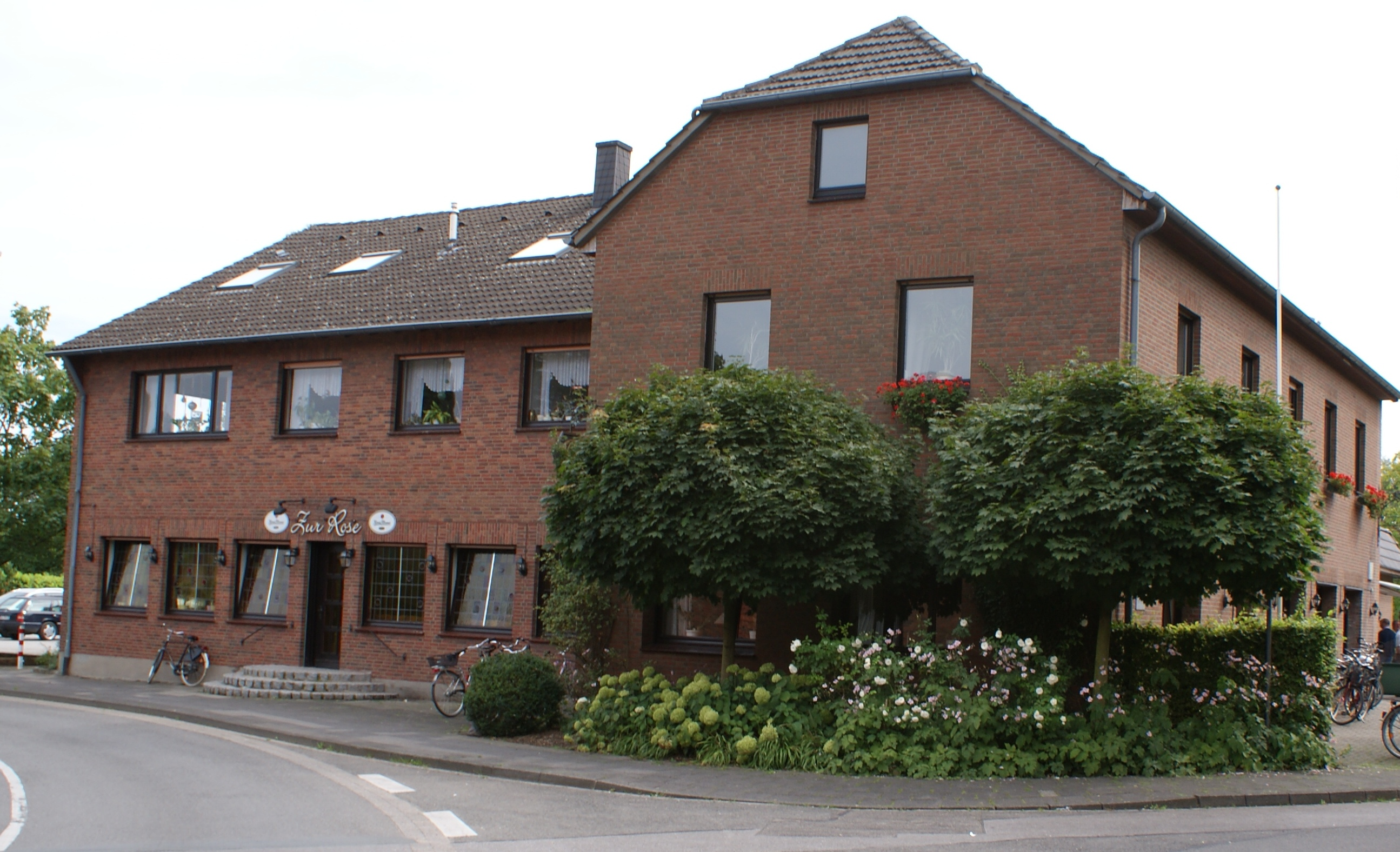 Foto des Gasthauses zur Rose in Rees mehr